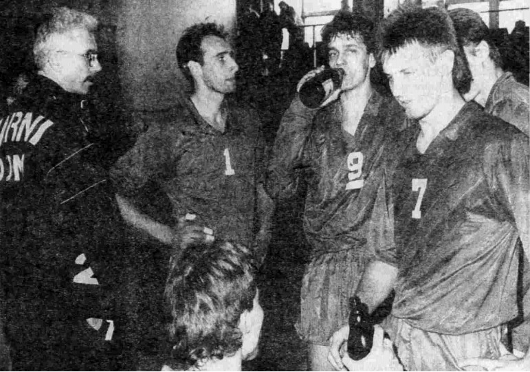 Siatkarze Czarnych Radom - sezon 1991/92